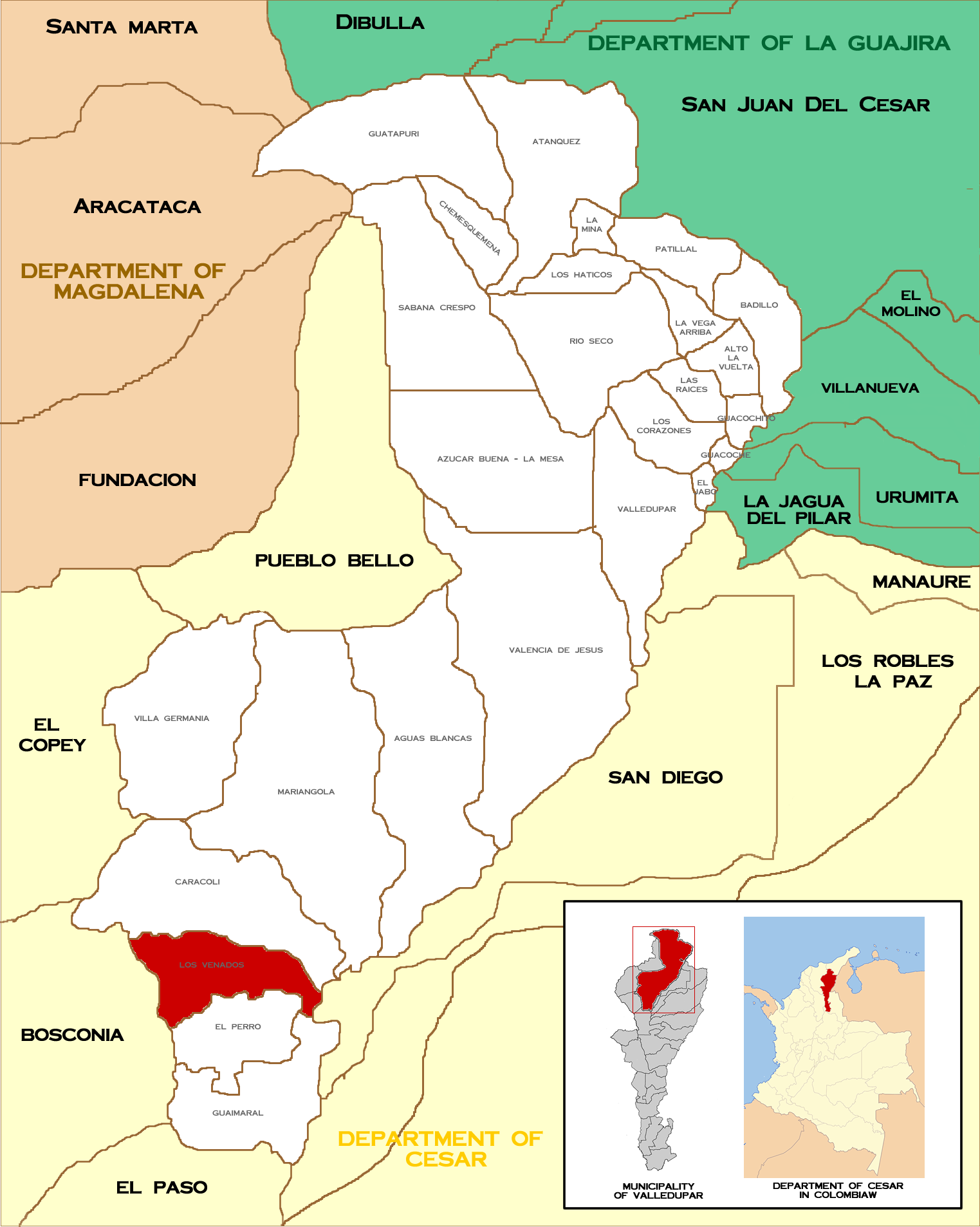 Map of Corregimientos of Valledupar, Los Venados